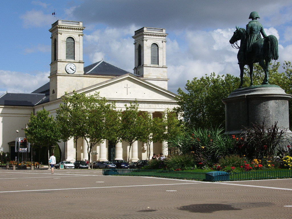 Église Saint-Louis de La Roche-sur-Yon et statue de Napoléon Ier (154) de Nieuwerkerke, Place Napoléon, La Roche-sur-Yon, France.